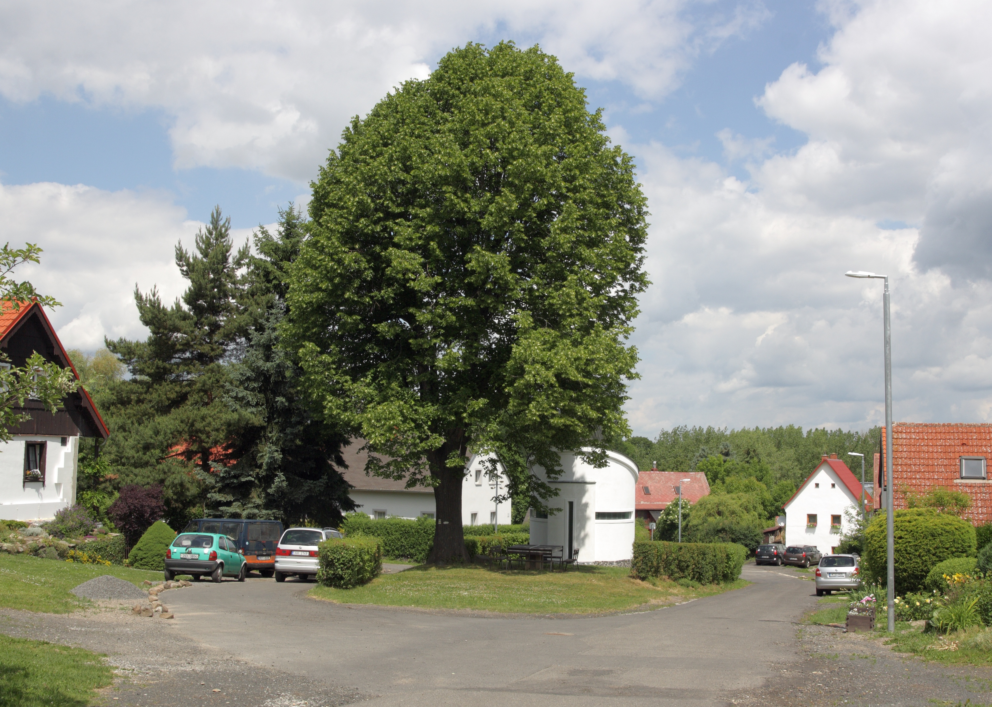 Bílka - náves, pohled od jihu.